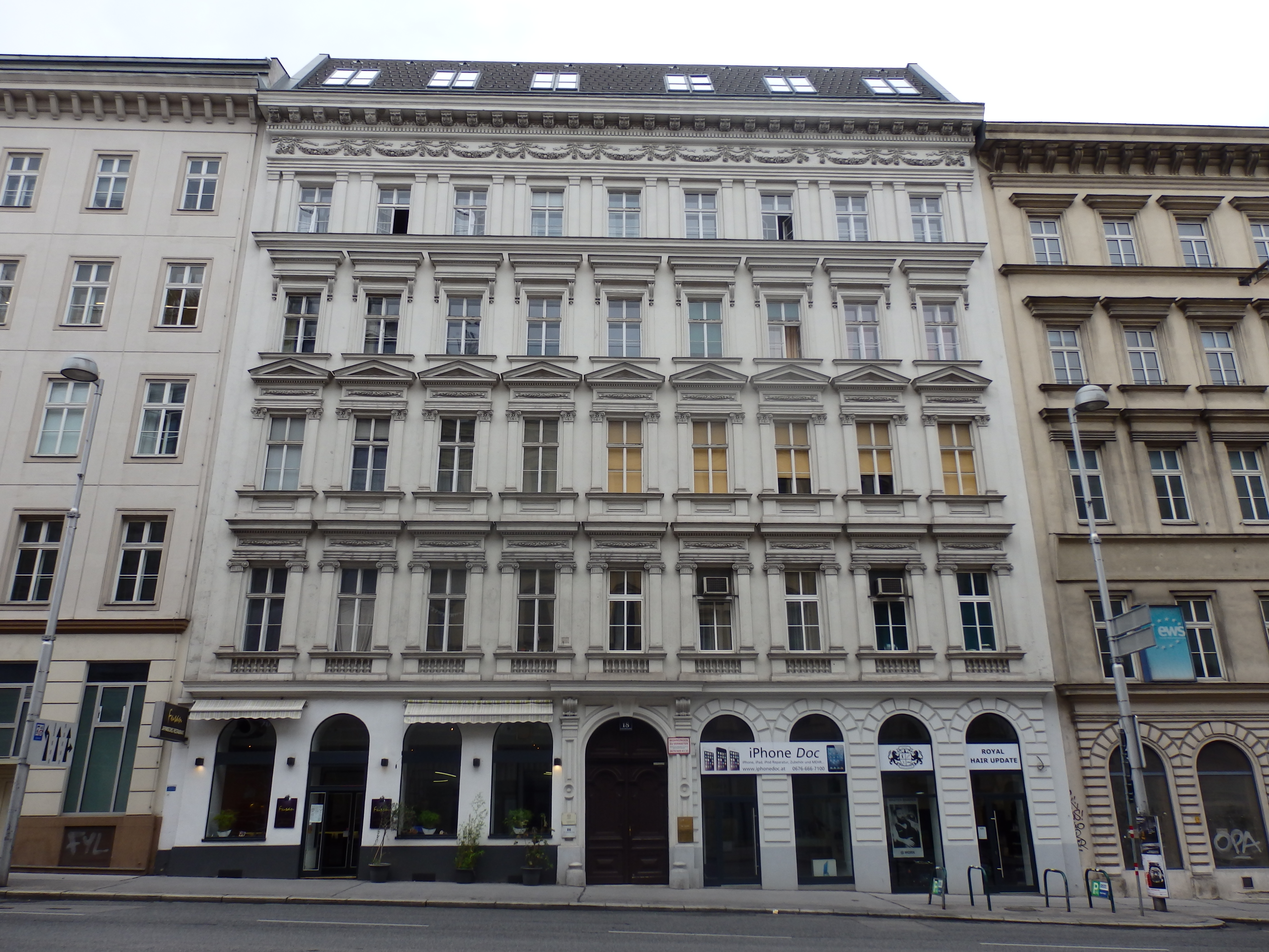 Haus (1868) von Anton Huber, Getreidemarkt 18, Wien-Innere Stadt